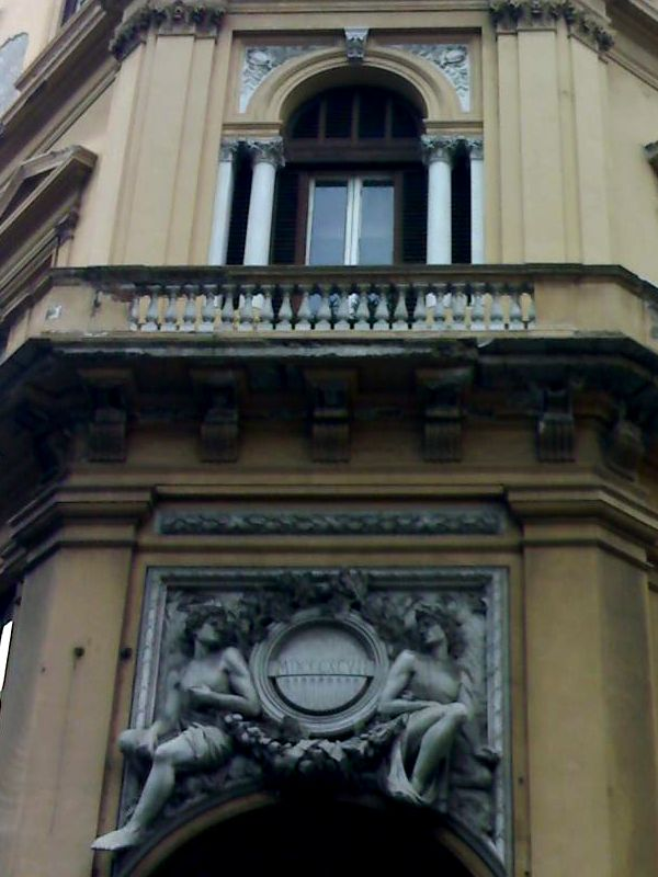 Particolare del rilievo sul portone d'ingresso del Palazzo Capone (Napoli)